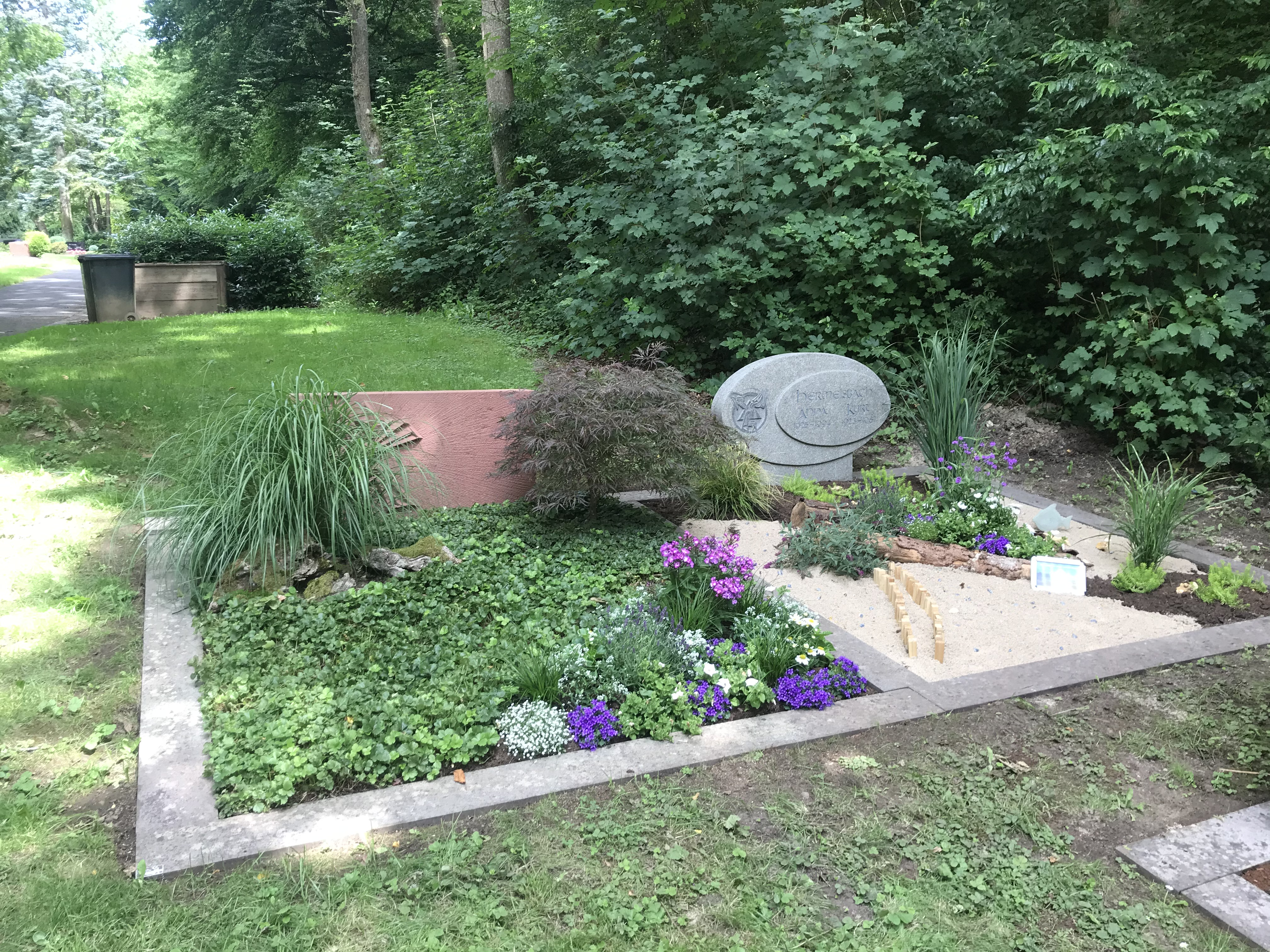 Eine typische Bepflanzung der Region; Golderdbeere mit einem Schlitzahorn und einem Gras. Rechts ein Mustergrab für eine verstorbene Person welche die Natur und die See zu Lebzeiten liebte